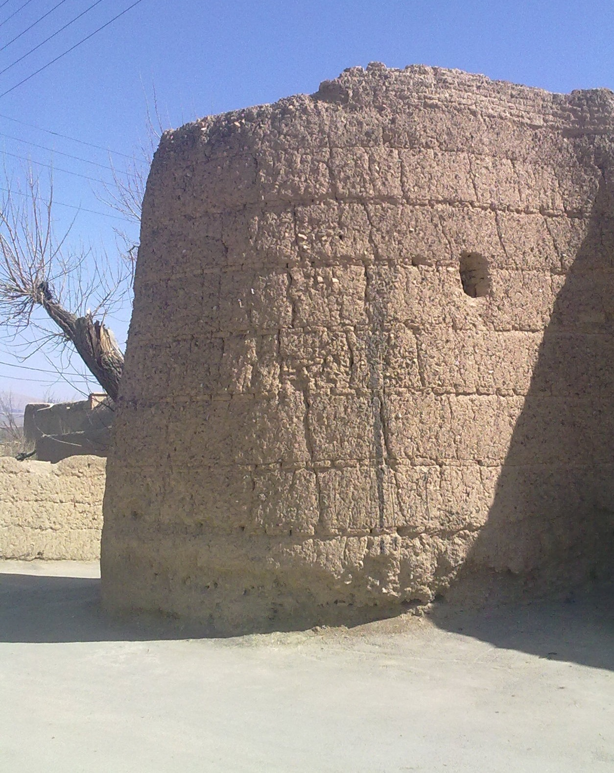 jamshidi Castle قلعه جمشیدی